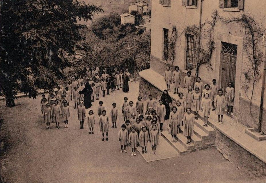 Scuola delle Orsoline a Fane (frazione di Negrar, provincia di Verona) in una foto del 1920